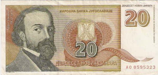 20 Yugoslav dinars note (Novi dinar)